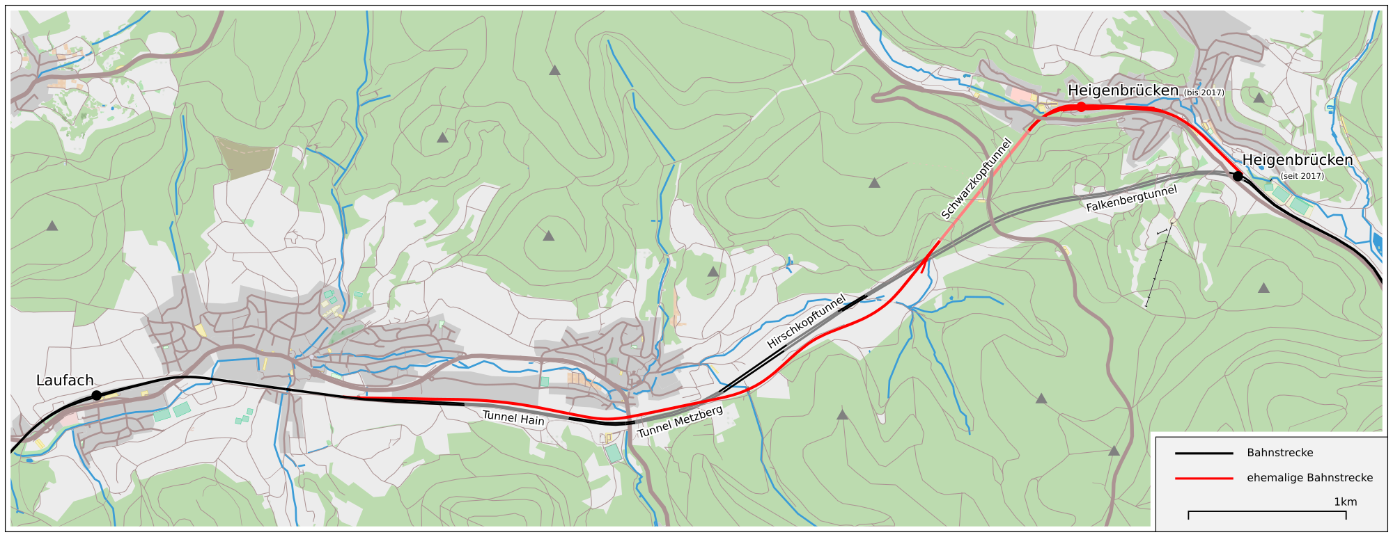 Karte der Spessartrampe mit der aktuellen und ehemaligen Streckenführung